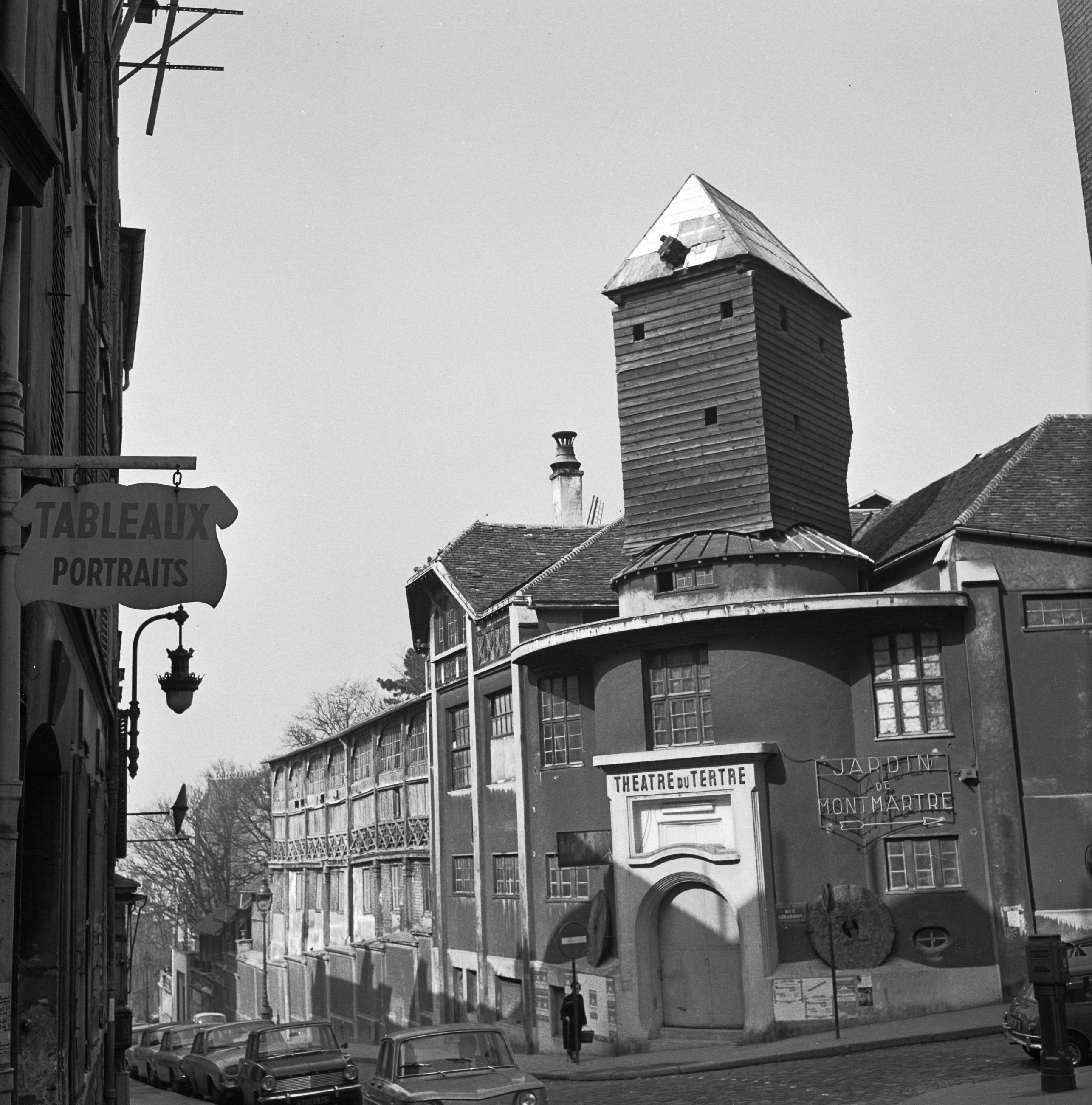 Collectie / Archief : Fotocollectie Van de Poll Reportage / Serie : Pariser Bilder [Het straatleven van Parijs] Beschrijving : Het Théâtre du Tertre, aan de achterzijde van Le Jardin du Montmartre Datum : 1965 Locatie : Frankrijk, Parijs Trefwoorden : discotheken, theaters Fotograaf : Poll, Willem van de Auteursrechthebbende : Nationaal Archief Materiaalsoort : Negatief (6x6) Nummer archiefinventaris : bekijk toegang 2.24.14.02 Bestanddeelnummer : 254-0577